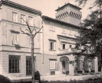 Una foto storica di Villa Maria a Livorno